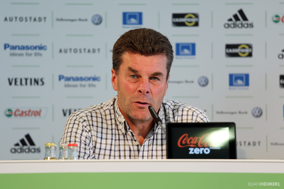 Dieter Hecking, VfL Wolfsburg bei der Pressekonferenz zur Vorstellung von Luiz Gustavo.